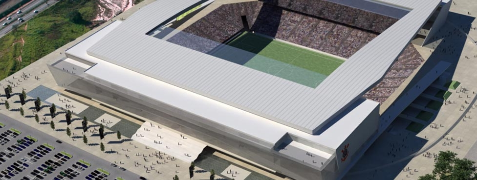 Arena de Itaquera em 2014.